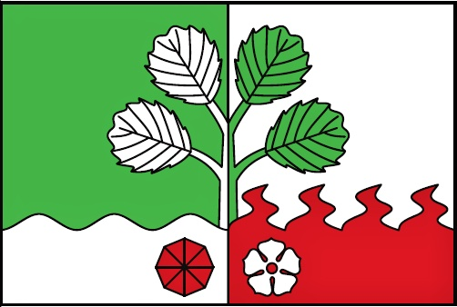 Vlajka Horní Olešnice